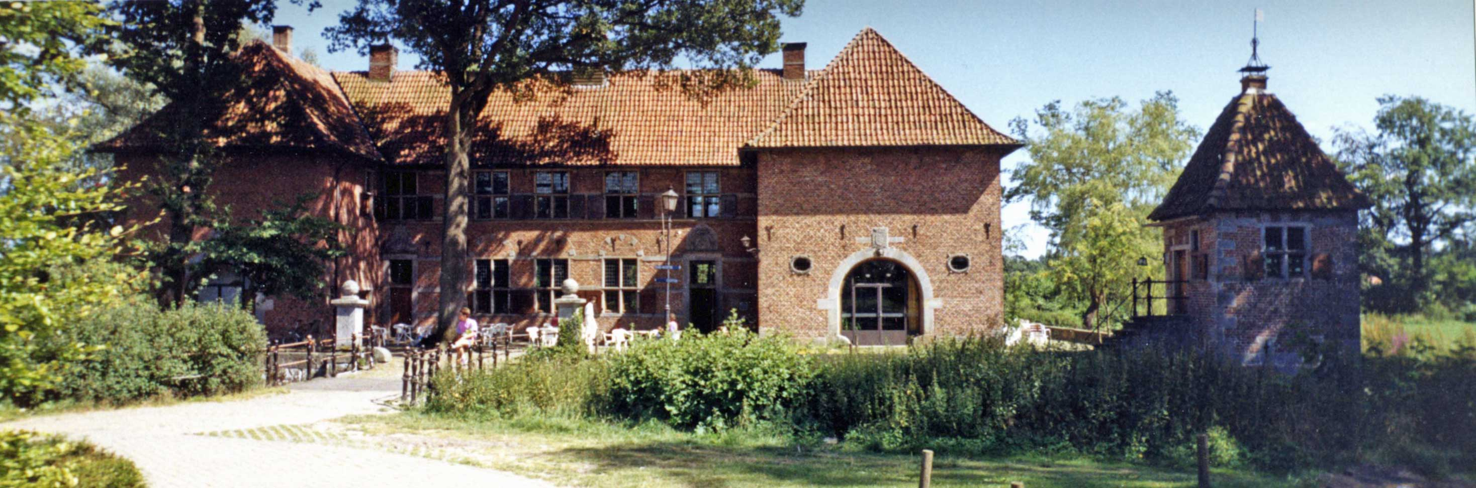 Havezate "de Breckelenkamp" in Lattrop te Overijssel